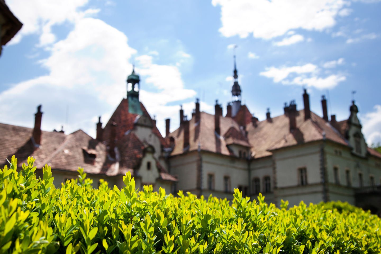 Парк санаторію «Карпати», Мукачівський р-н, урочище «Берегвар»